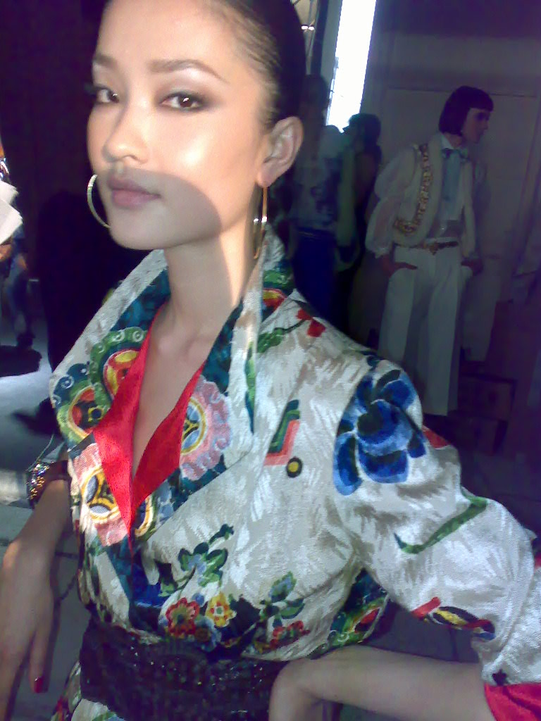 杜鵑（1982年9月15日－），中國大陸著名模特兒，上海戏剧学院戏曲舞蹈分院毕业，2002年新丝路中國模特大赛獲得冠军